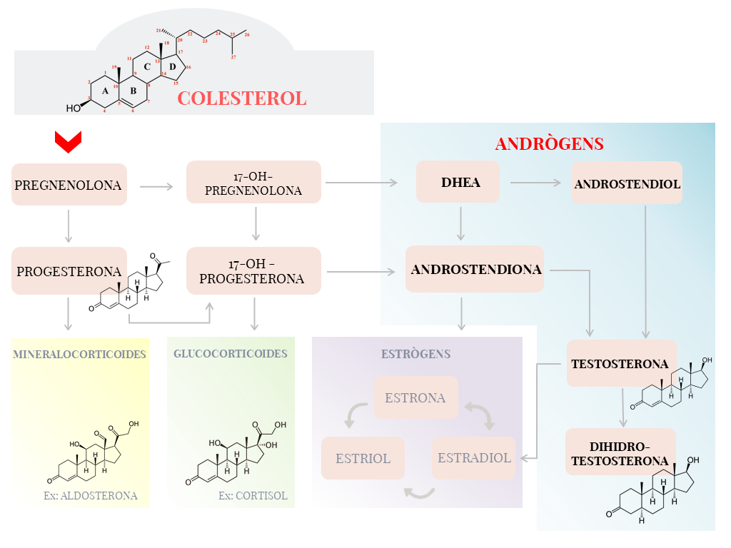 Mapa conceptual de les relacions entre els diferents substrats de la biosíntesi dels andrògens, des del precursor (COLESTEROL) fins els diferents andrògens.